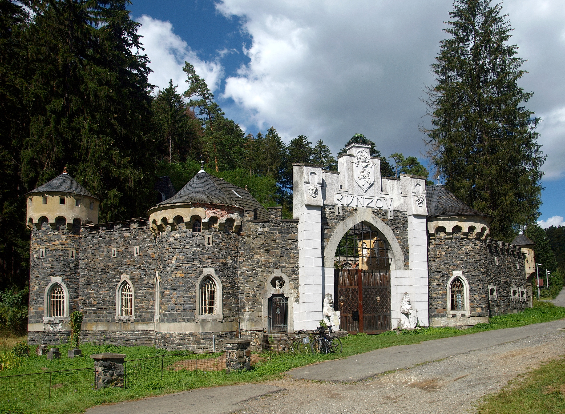 Hrad Kunzov (Radíkov), k. ú. Radíkov u Hranic a k. ú. Hrabůvka u Hranic 51, Radíkov